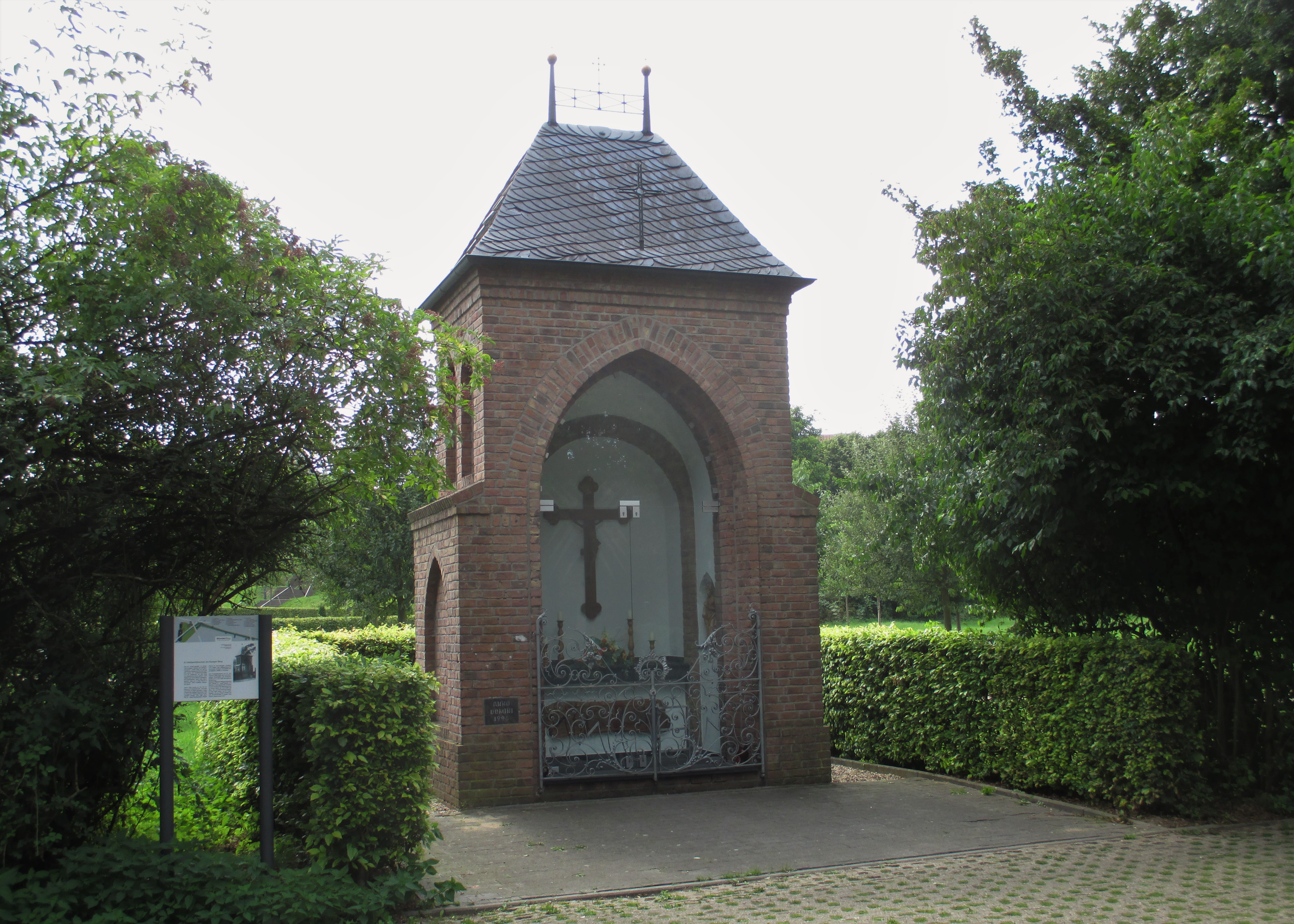 1998 wieder aufgebaute St. Josef-Kapelle an der B 510.